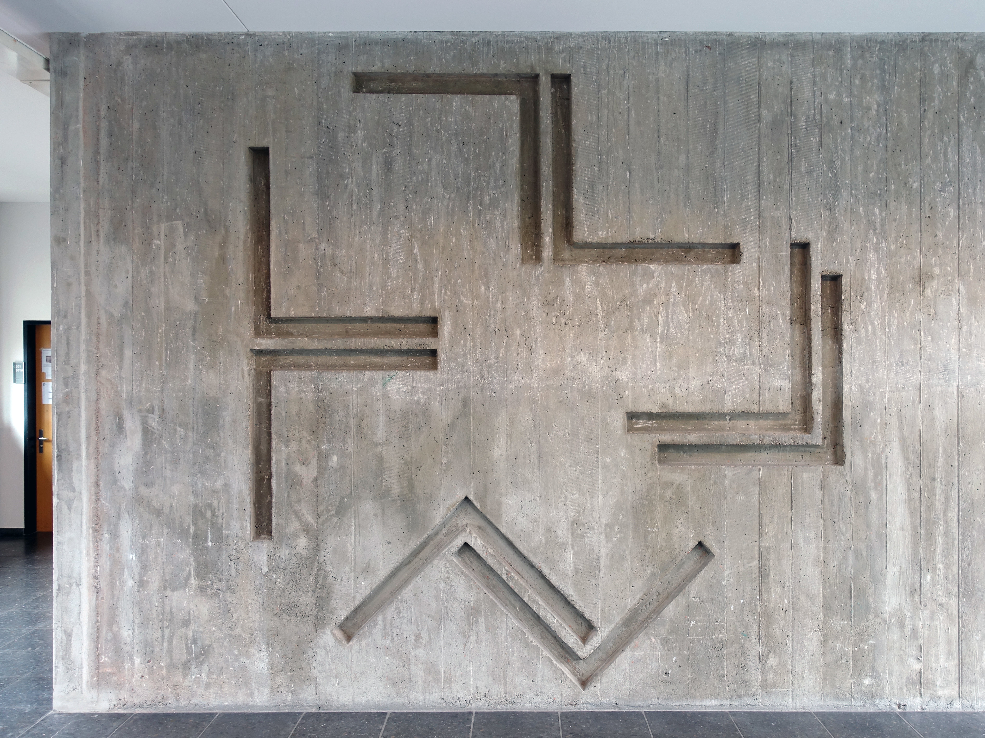 Relief von Armin Hofmann im kunstgewerblichen Trakt der Allgemeinen Gewerbeschule Basel